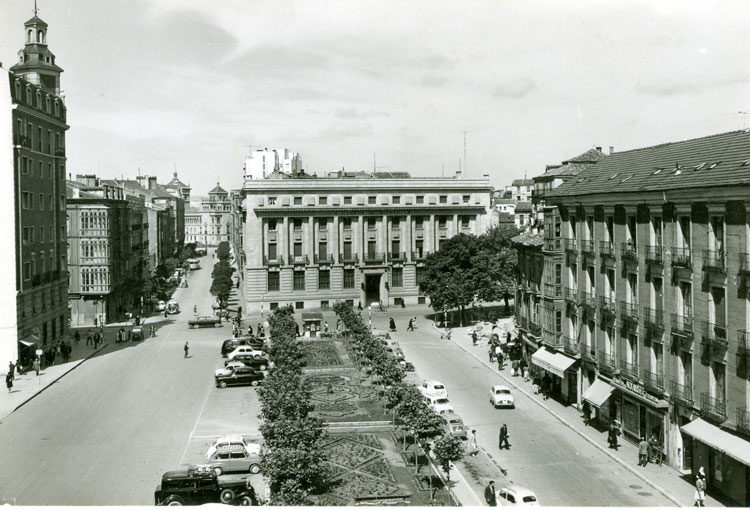 Plaza de España - Valladolid - Postal Color